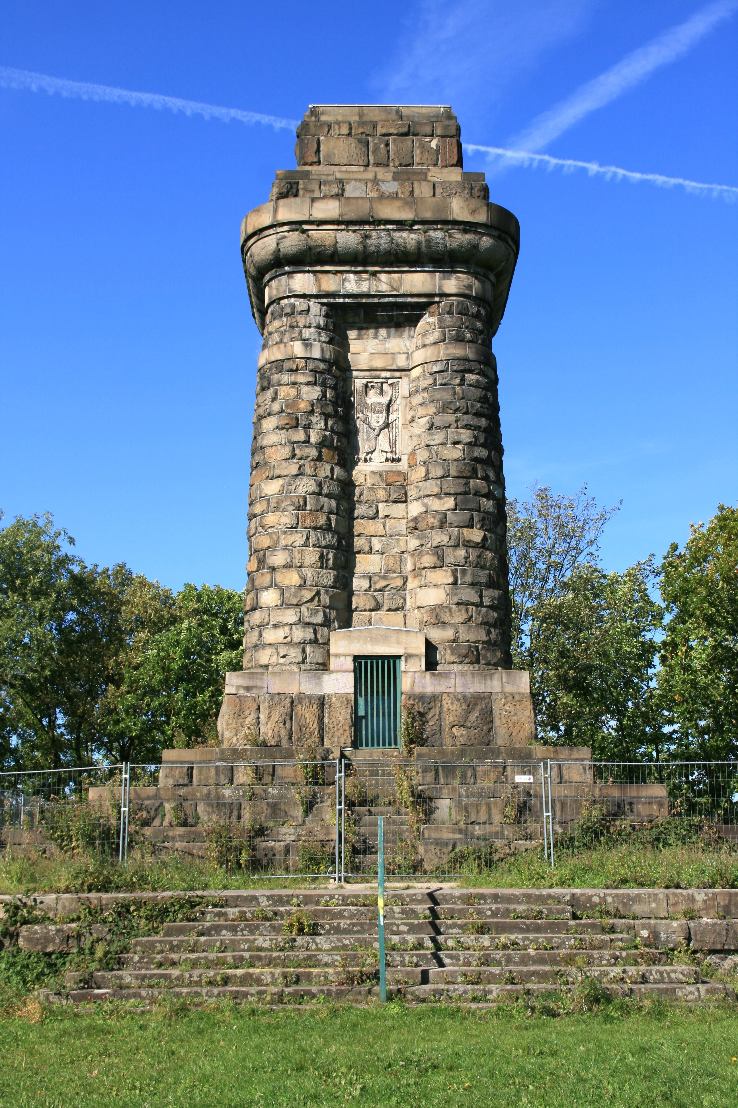 Bismarckturm auf dem Goldberg in Hagen